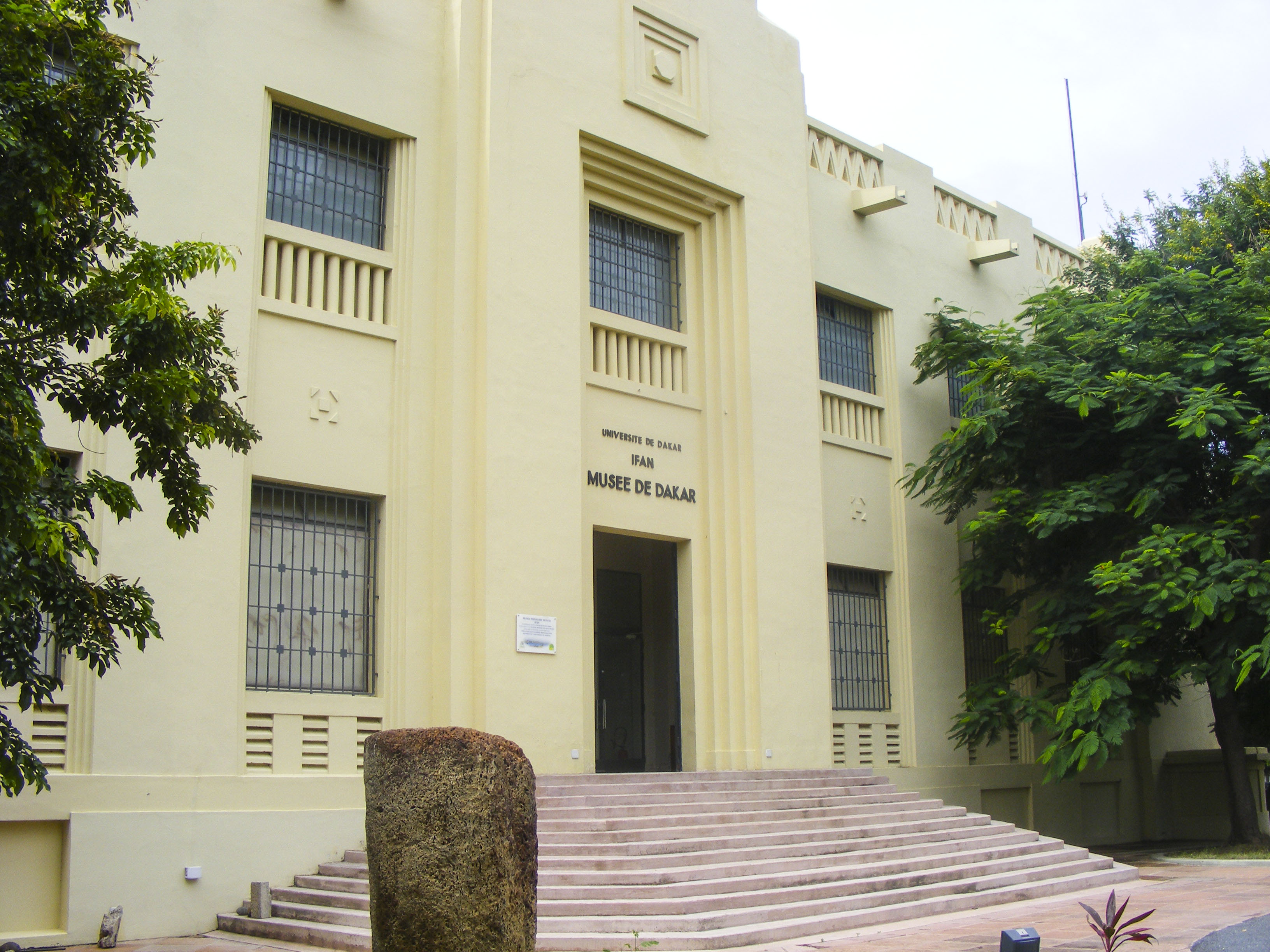 Photo: Lamine Niang